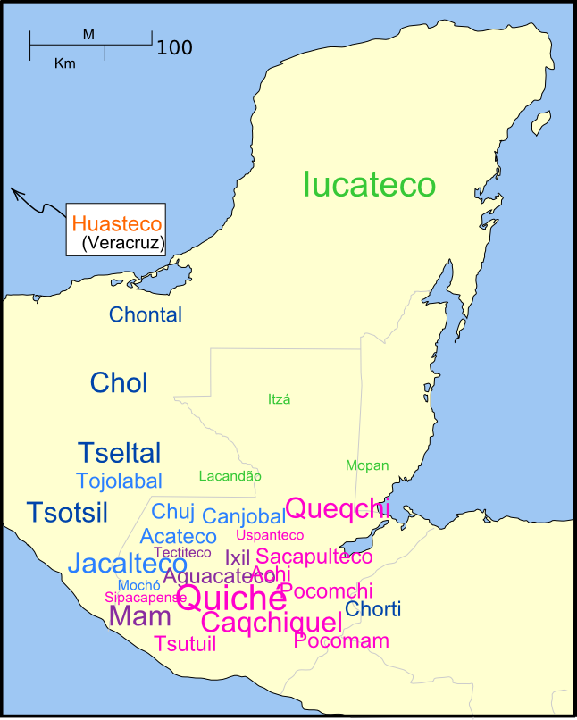 Mapa mostrando áreas actuais das línguas maias. As cores dos nomes das línguas mostram grupos aparentados. O tamanho do texto mostra o número relativo de falantes.